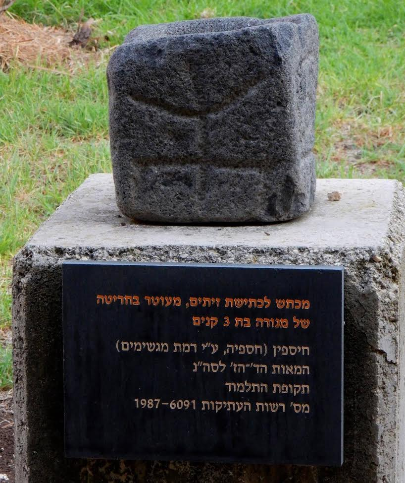 מכתש לכתישת זיתים, מעוטר בחריטה של מנורה בת 3 קנים - חיספין. המאות הד'-הז', תקופת התלמוד. מספר רשות העתיקות: 1987-6091. מוצג במדרשת הגולן בחיספין.